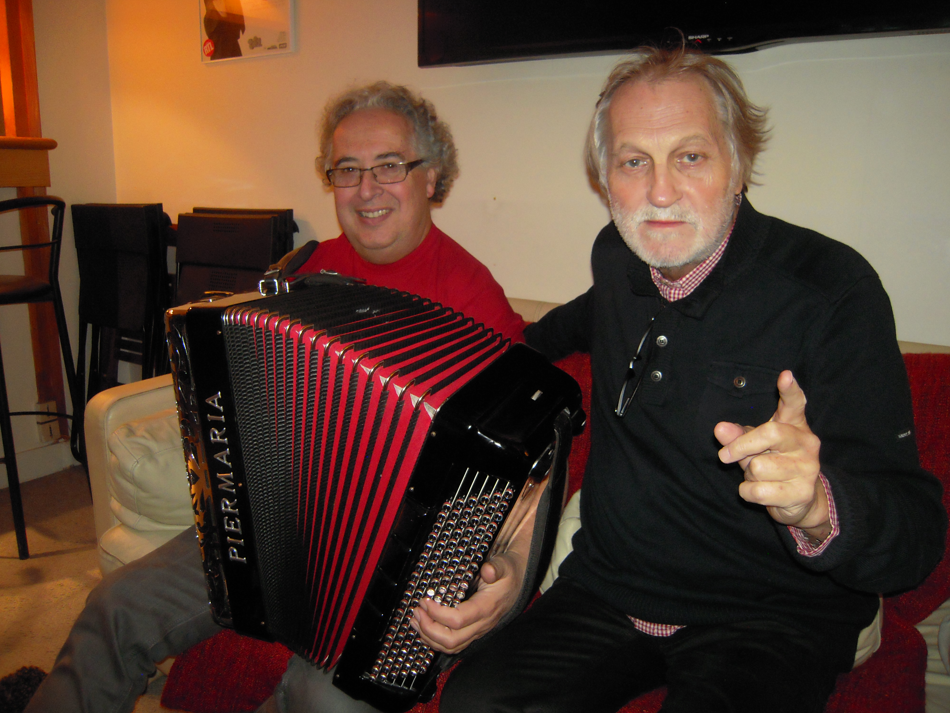 Jean Jacques debout & Jacques Ferchit